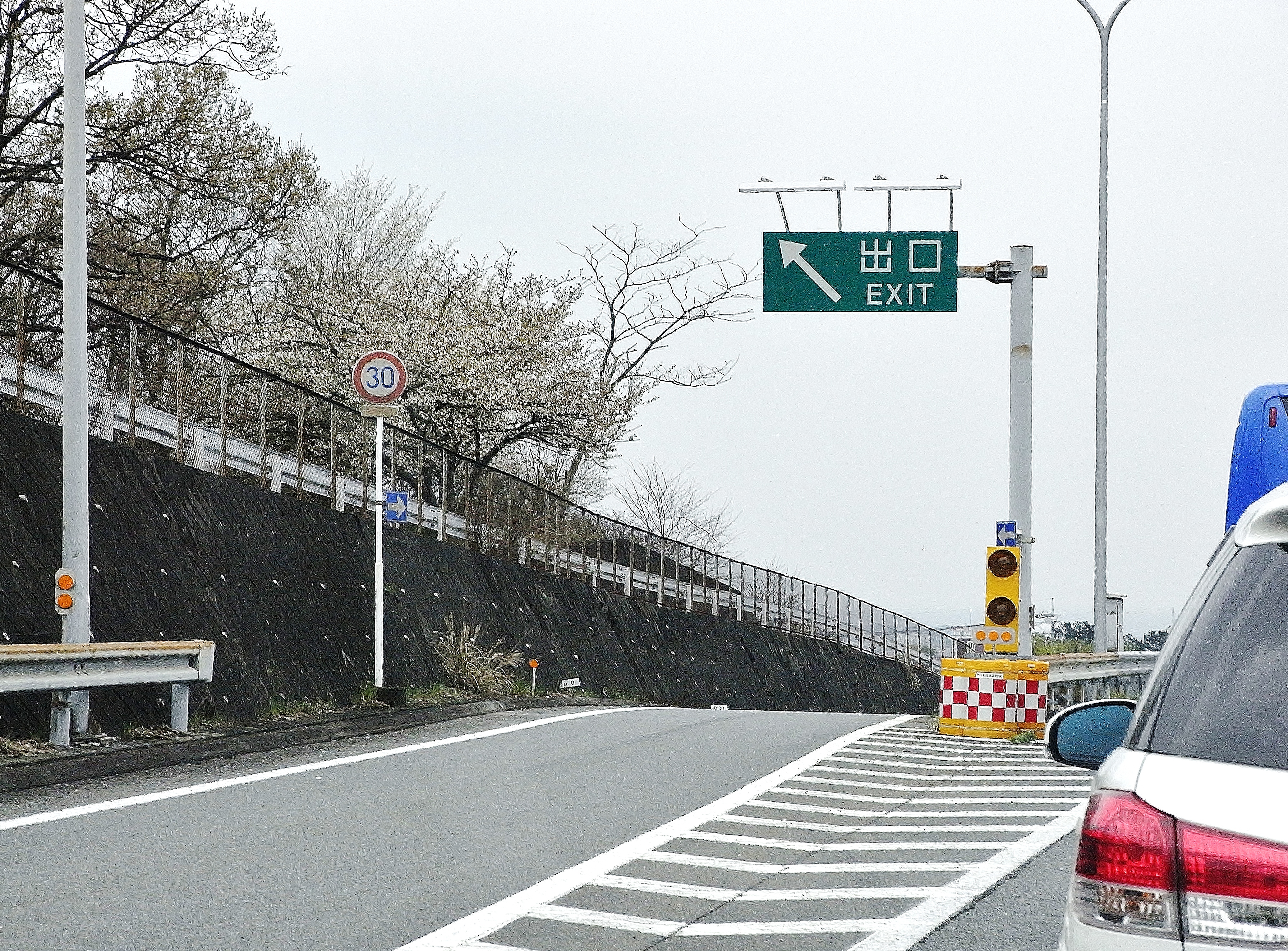 西富士道路広見IC、上り線出口